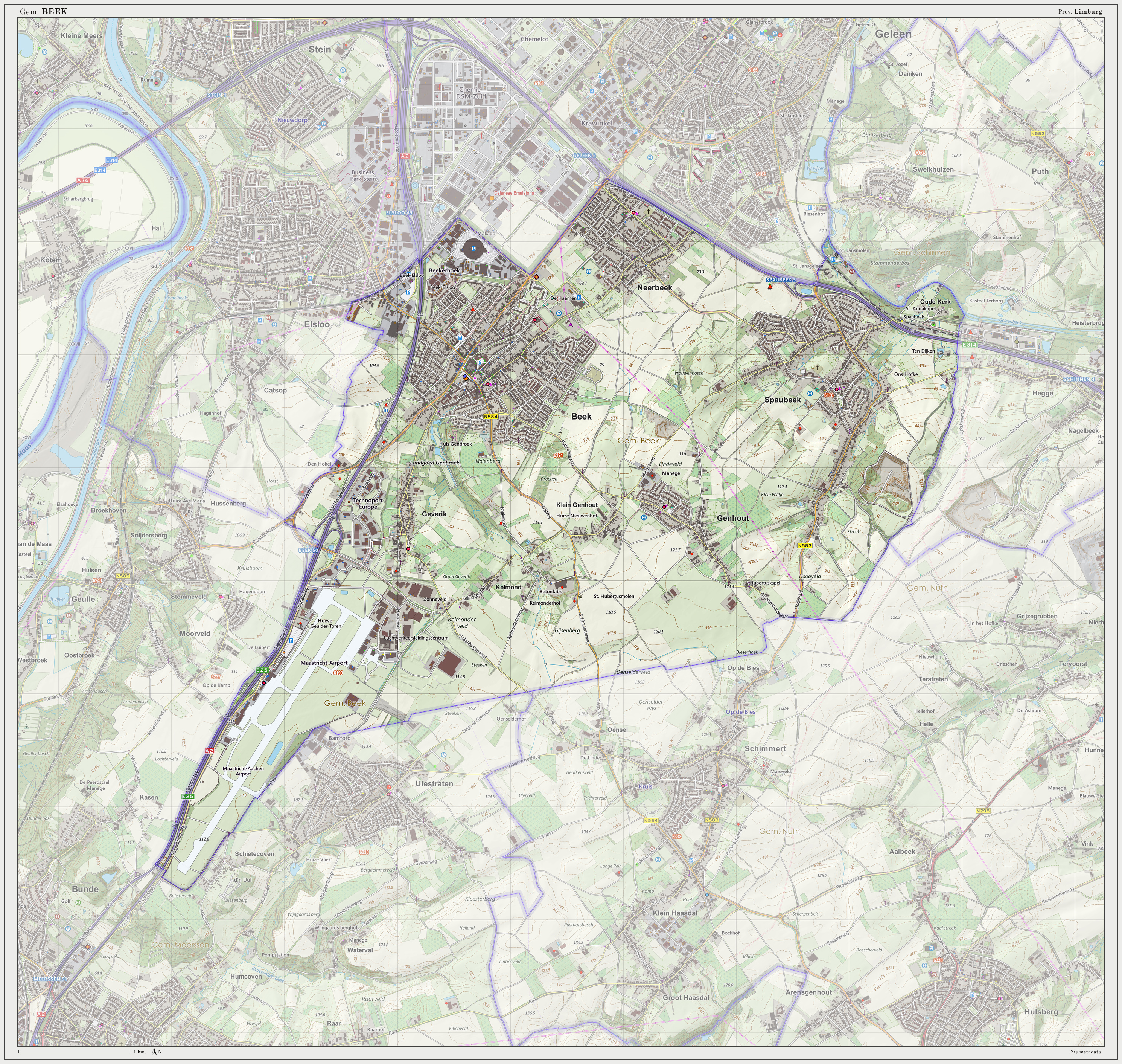 Topografische kaart van (gemeente) per maart 2014. Resolutie: 300 pixels/km. Kaartbeeld samengesteld uit de open geodata van de Top10NL en Top25namen (Basisregistratie Topografie, Kadaster 28-feb-2014), Creative Commons BY licentie. Gebouwvlakken uit open geodata BAG extract (8-mrt-2014). Wegen uit de OpenStreetMap (8-mrt-2014), OpenStreetMap community. Schaduwreliëf uit de Actuele Hoogtekaart AHN2 (8-mrt-2014). Samenstelling en kleurenschema: Jan-Willem van Aalst, met QGIS2. Zie ook de Legenda.